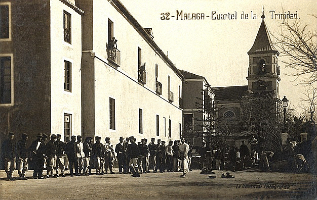 Cuartel de la Trinidad en Málaga, alrededor de 1840